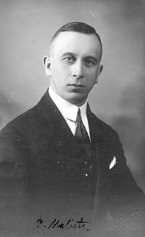 Pärtel Haliste